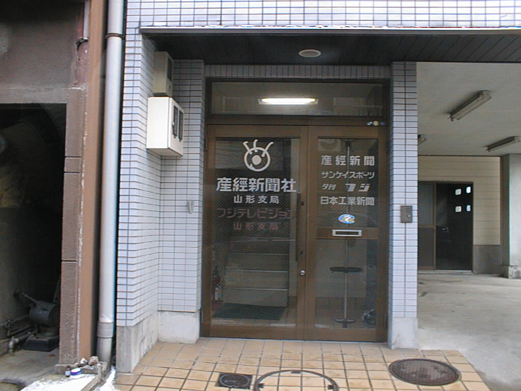 産経新聞社山形支局。かつてフジテレビ山形支局も所在。